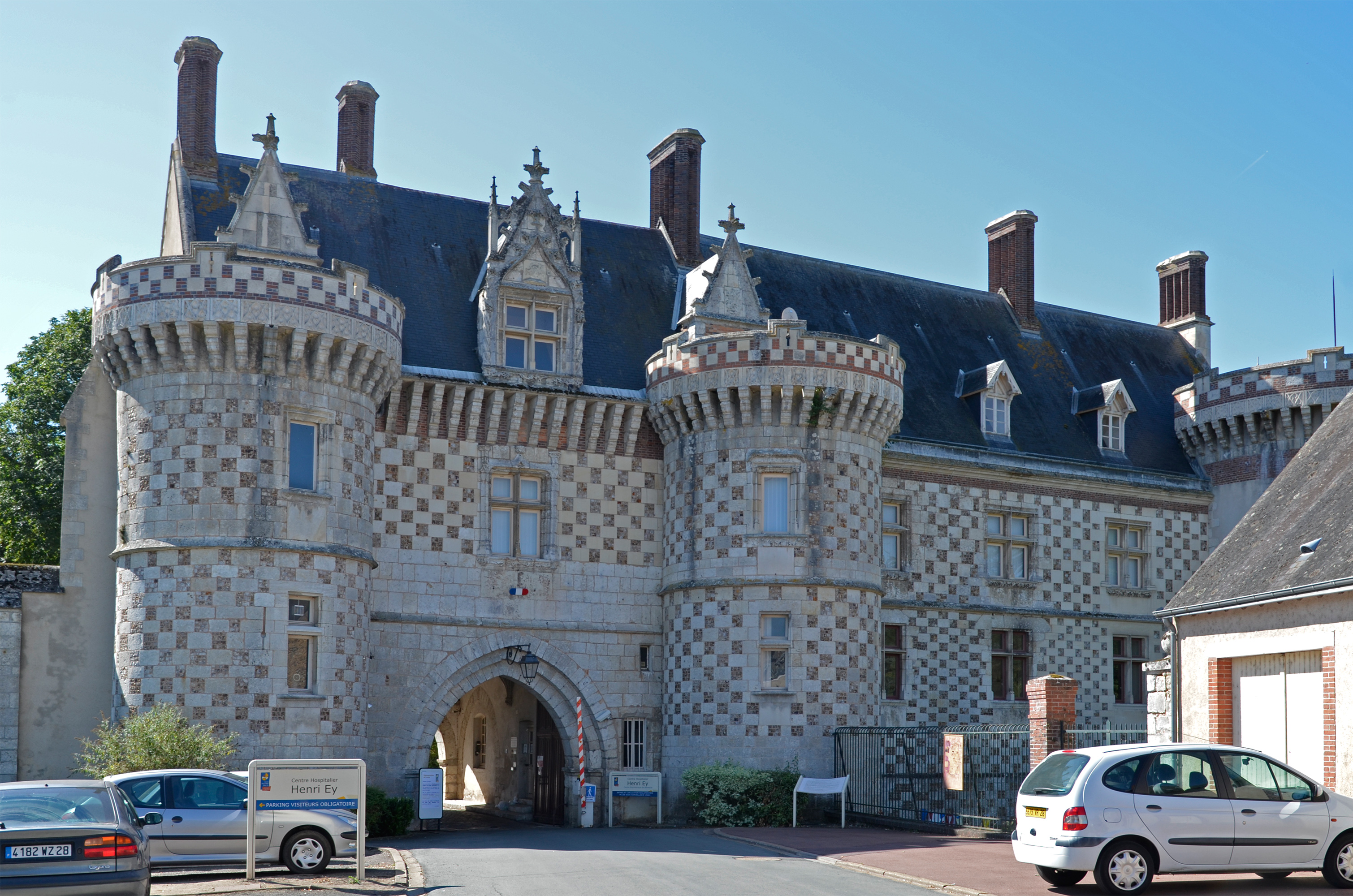 Abbaye Saint-Florentin de Bonneval - Eure-et-Loir .